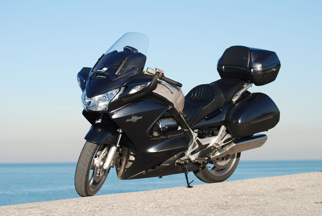 Honda Pan European Sachilles Black Metallic